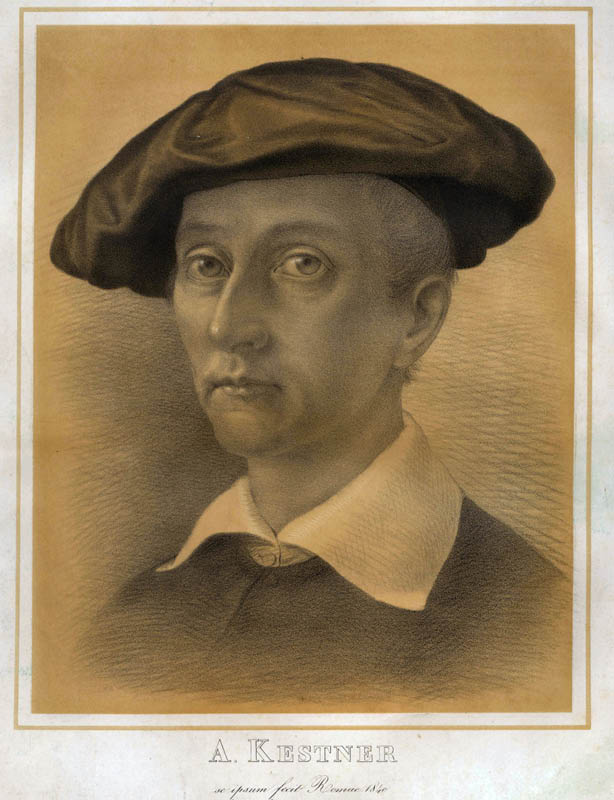 August Kestner (1777–1853), deutscher Diplomat und Kunstsammler